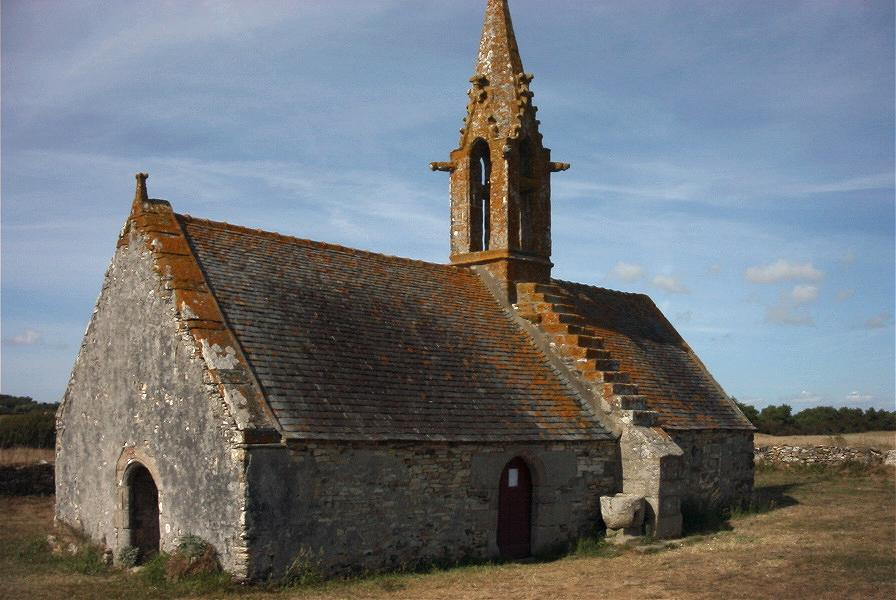 Chapelle de Saint-Vio (Treguennec) : vue générale